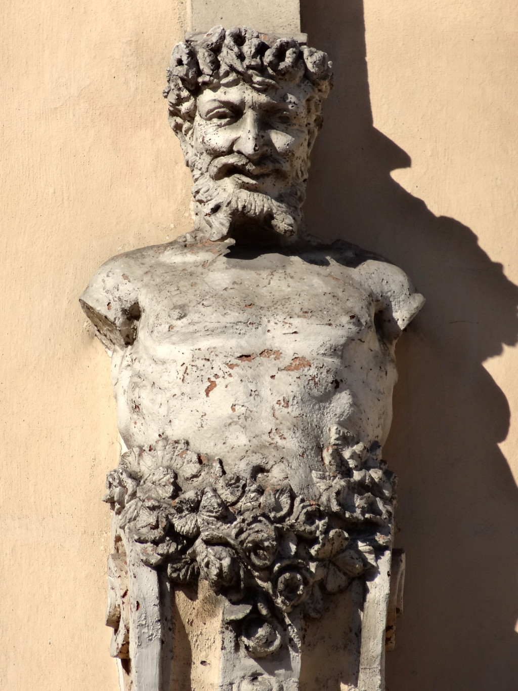 Kamienica Józefa Święcickiego ul. Gdańska 63 - Cieszkowskiego 2 w Bydgoszczy (1895-1897)